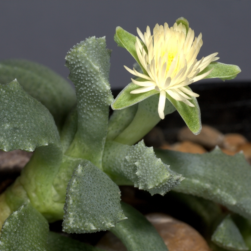 Art inom Tuffbladssläktet.